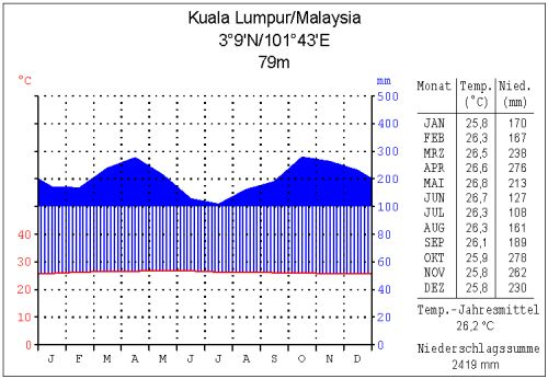 Kliamadiagramm Kuala Lumpur (selbst erstellt, GNU-FDL)